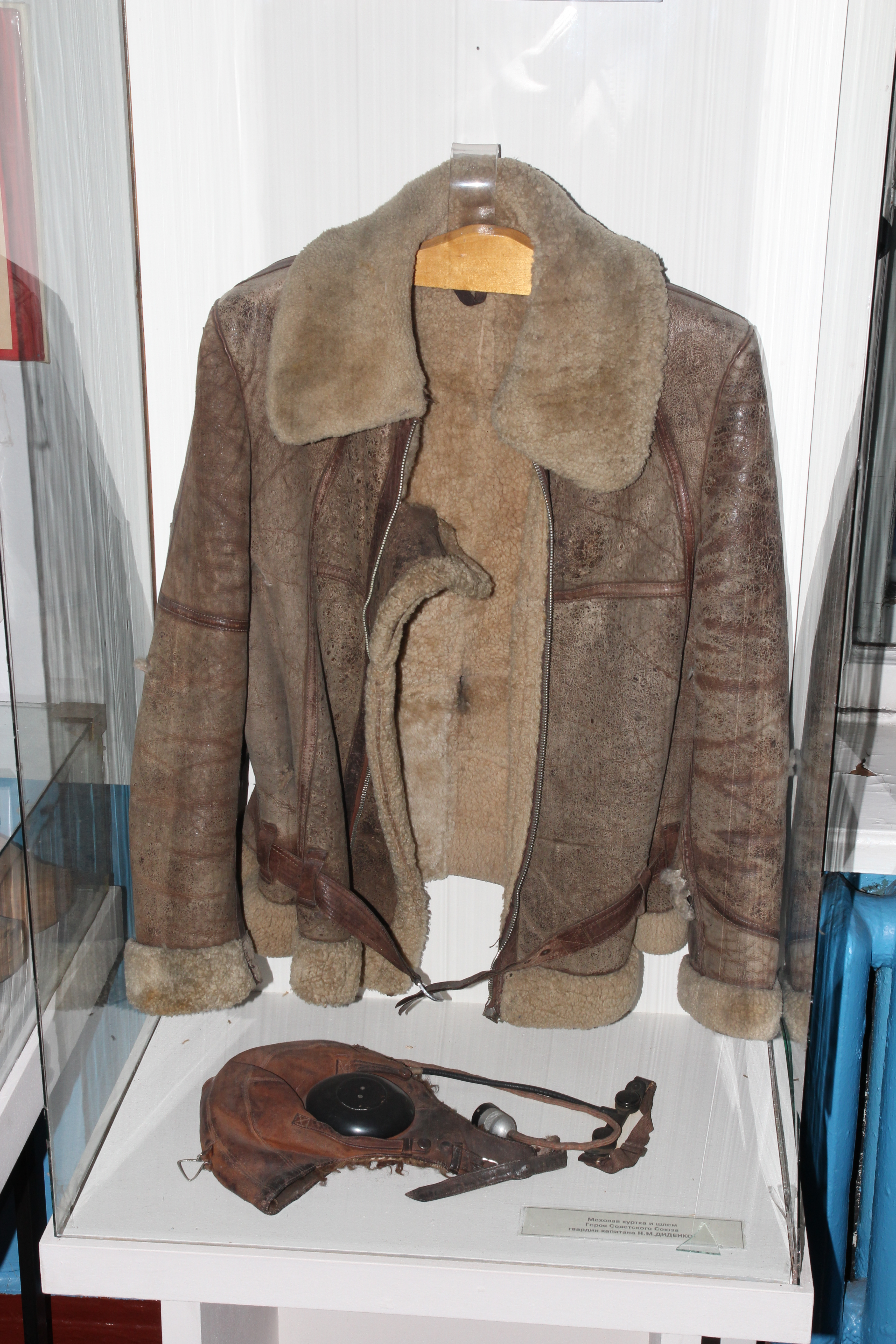 Меховая куртка и шлем Н. М. Диденко. "МЕховая куртка и шлем героя Советского Союза гвардии капитана Н. М. ДИДЕНКО."